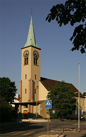 Reformierte Kirche in Birsfelden